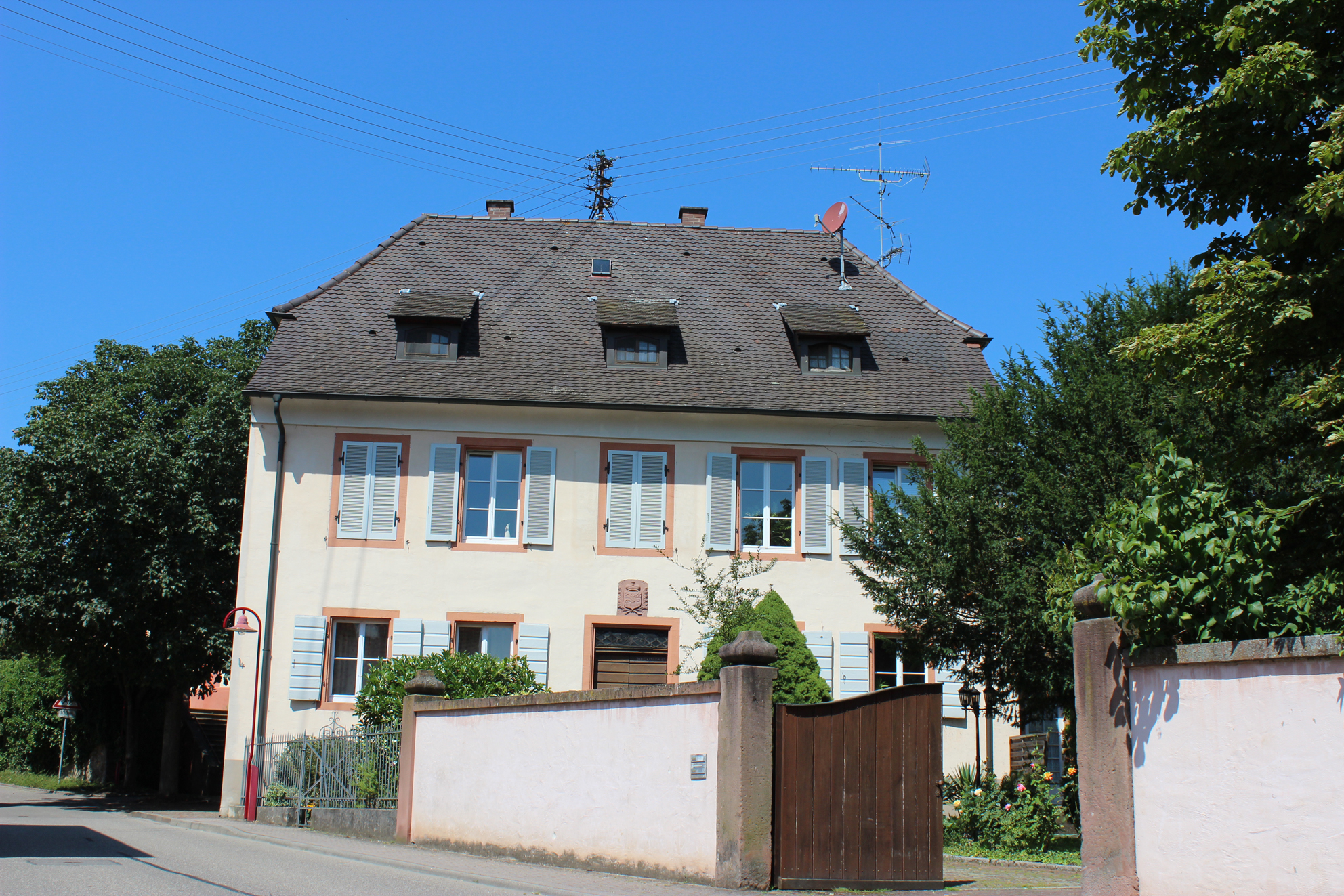 Katholisches Pfarrhaus March-Holzhausen